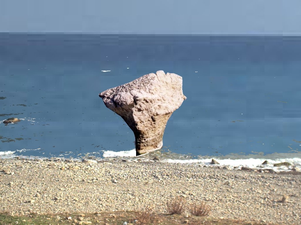 IL caratteristico scoglio ad incudine sotto il castello (Foto di Luigino C.)